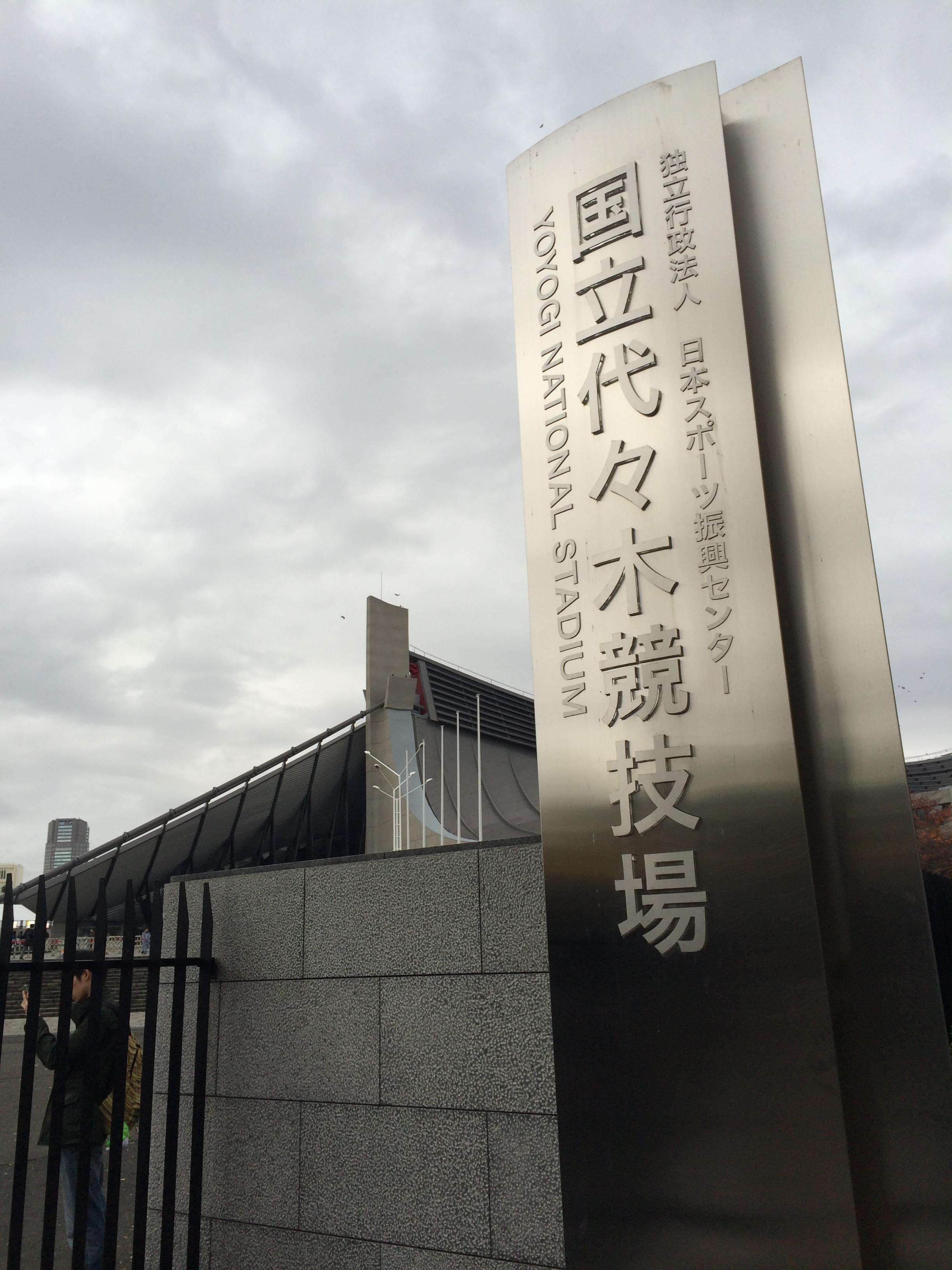 国立代々木競技場第一体育館会場看板